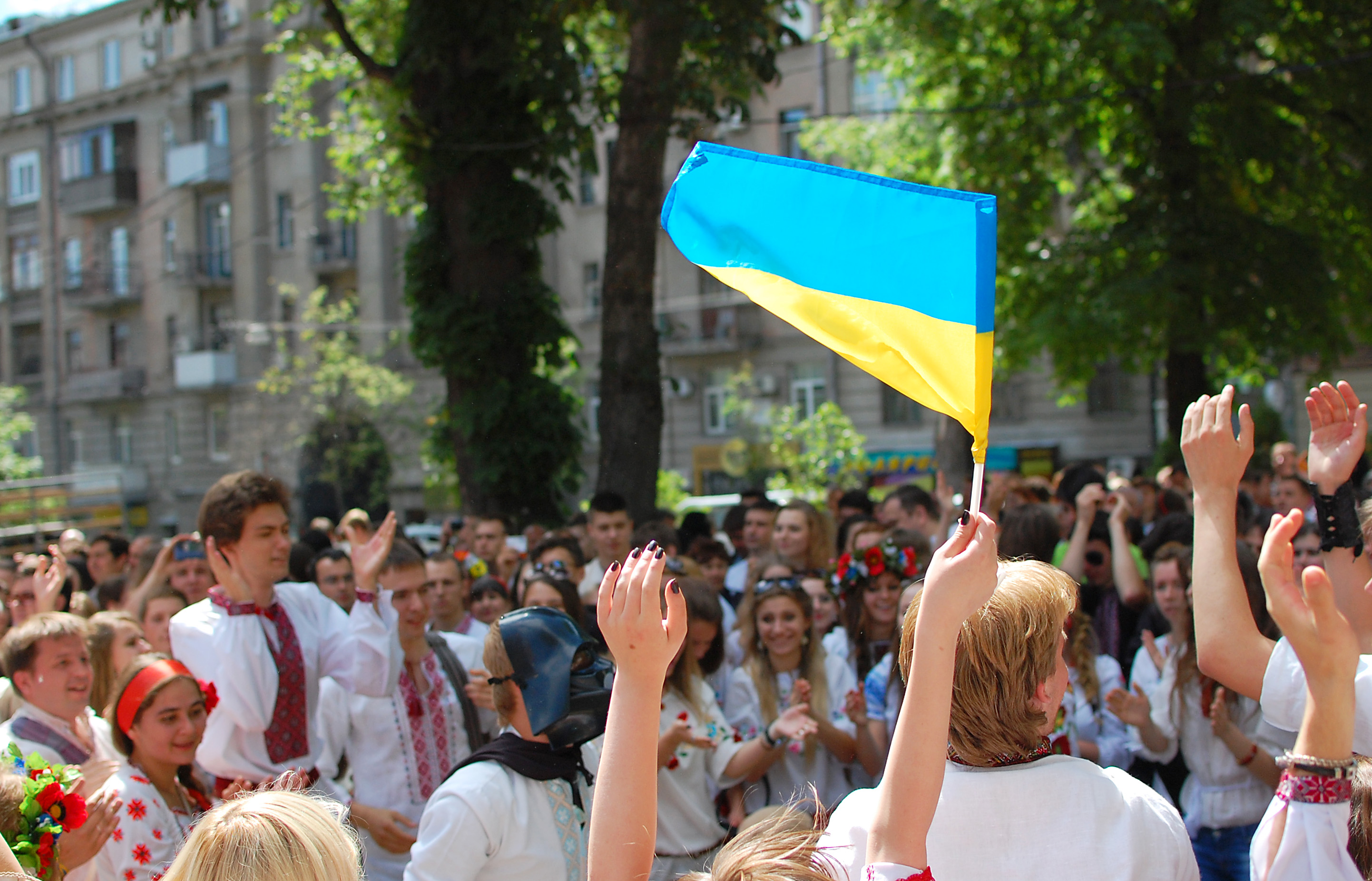 At vyshyvanka parade